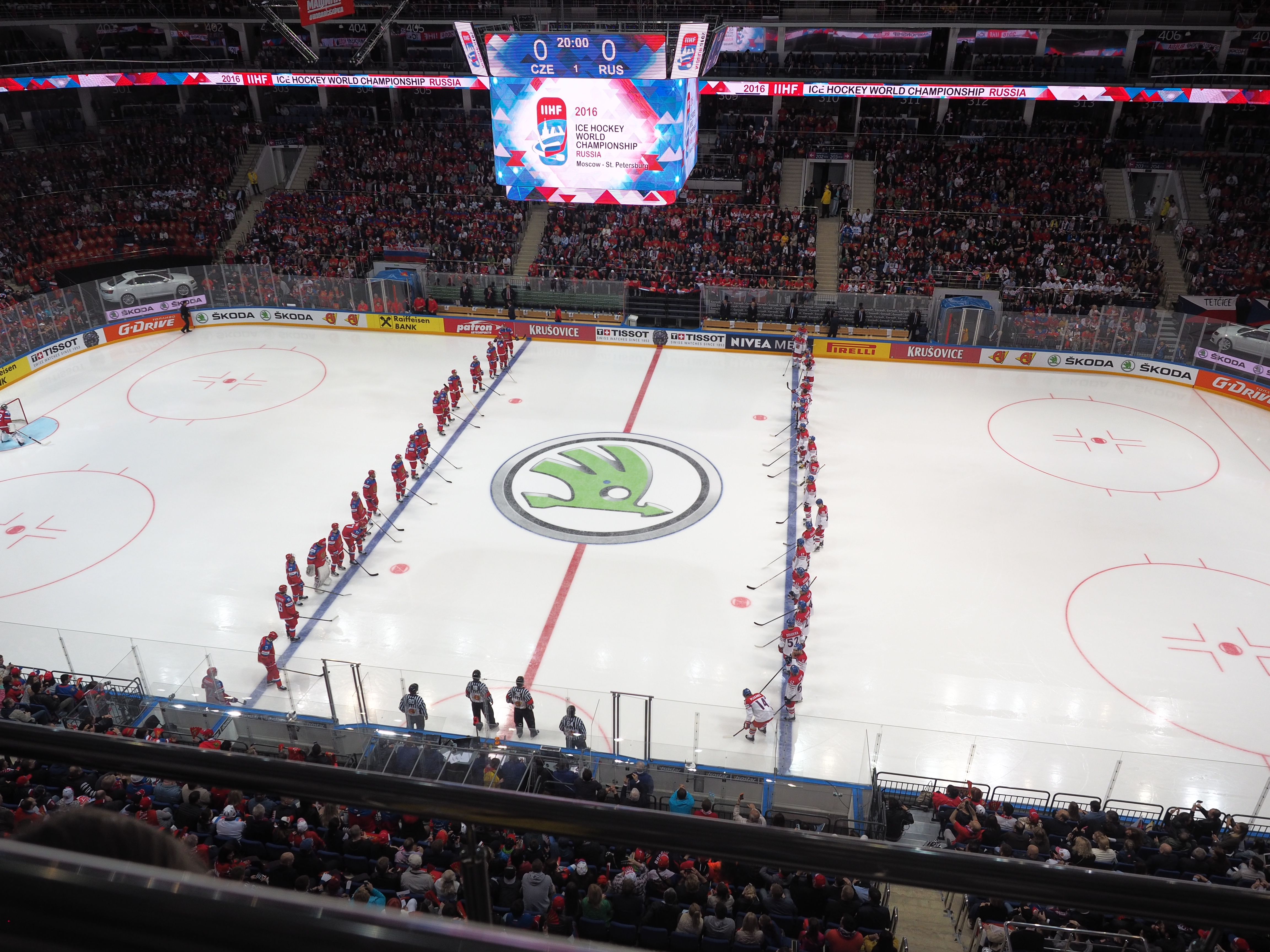 Матч Россия - Чехия